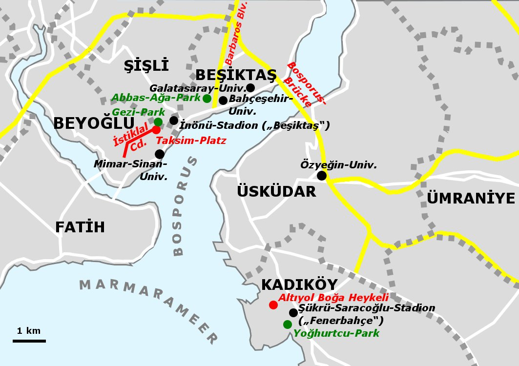 Von den Protesten in der Türkei 2013 besonders betroffene und benachbarte Istanbuler Stadtbezirke